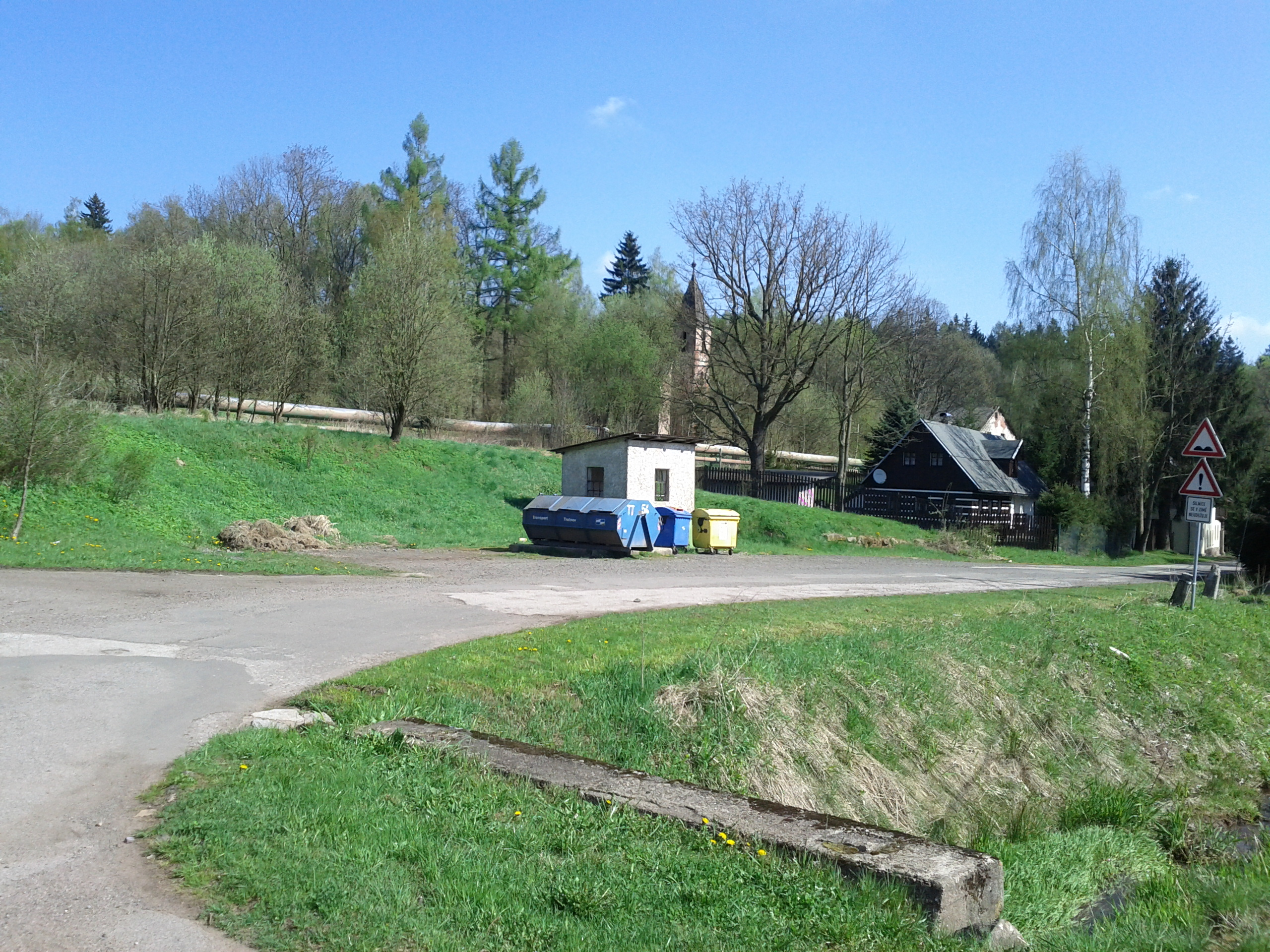 Slavětín